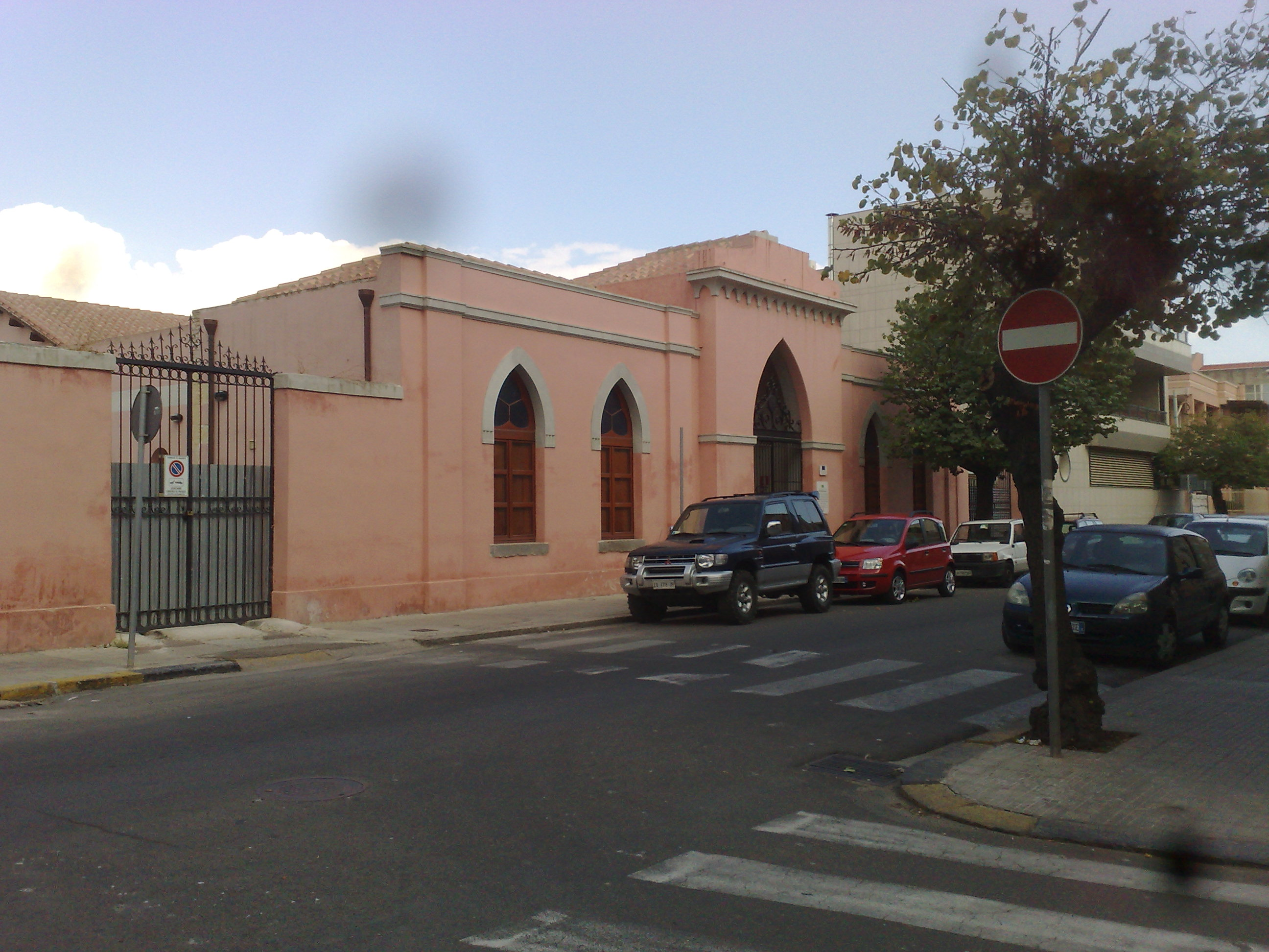 L'antico macello a Quartu Sant'Elena. Foto scattata da me l'11 settembre 2009